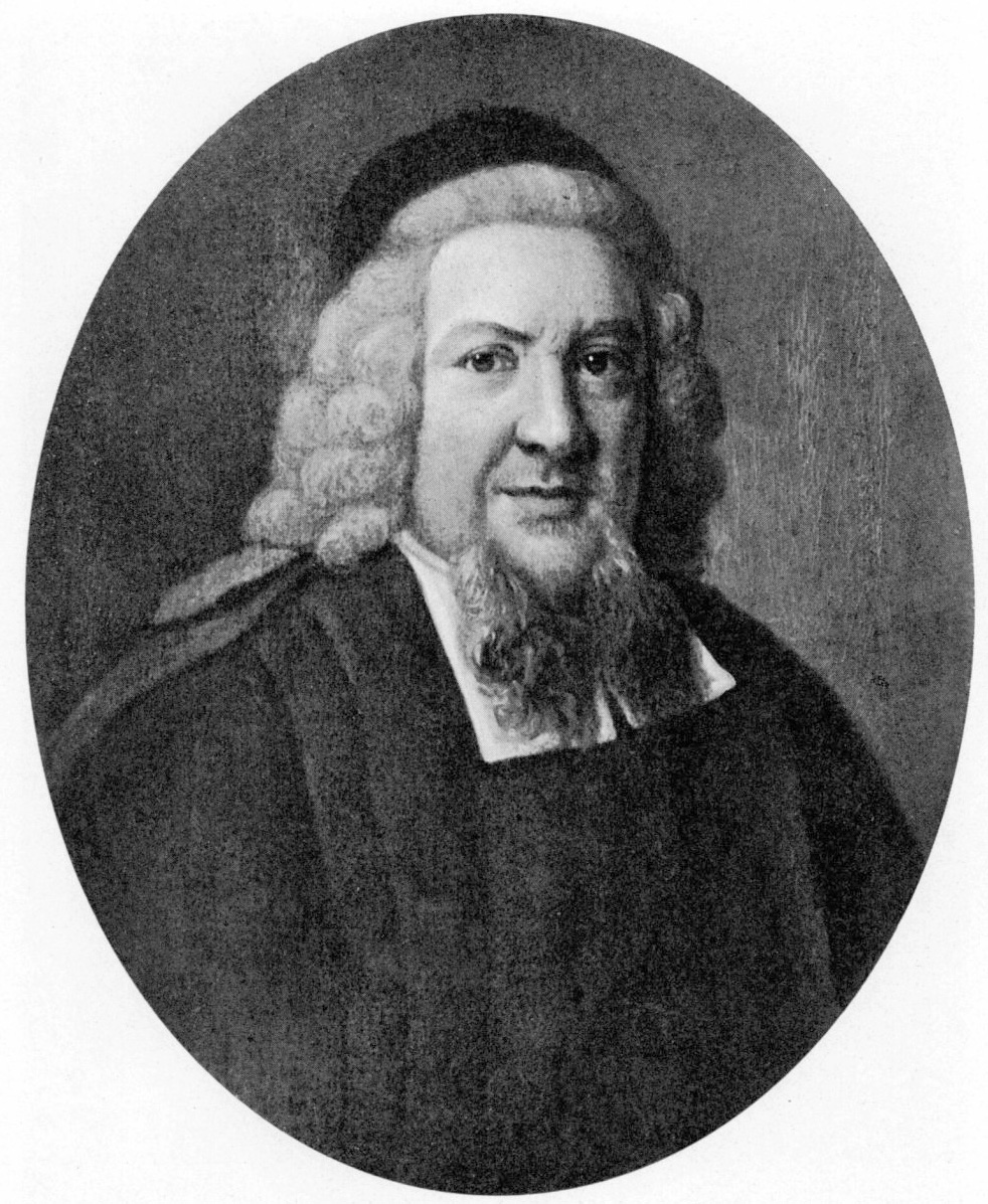 Georg Wallin den yngre (1686–1760).